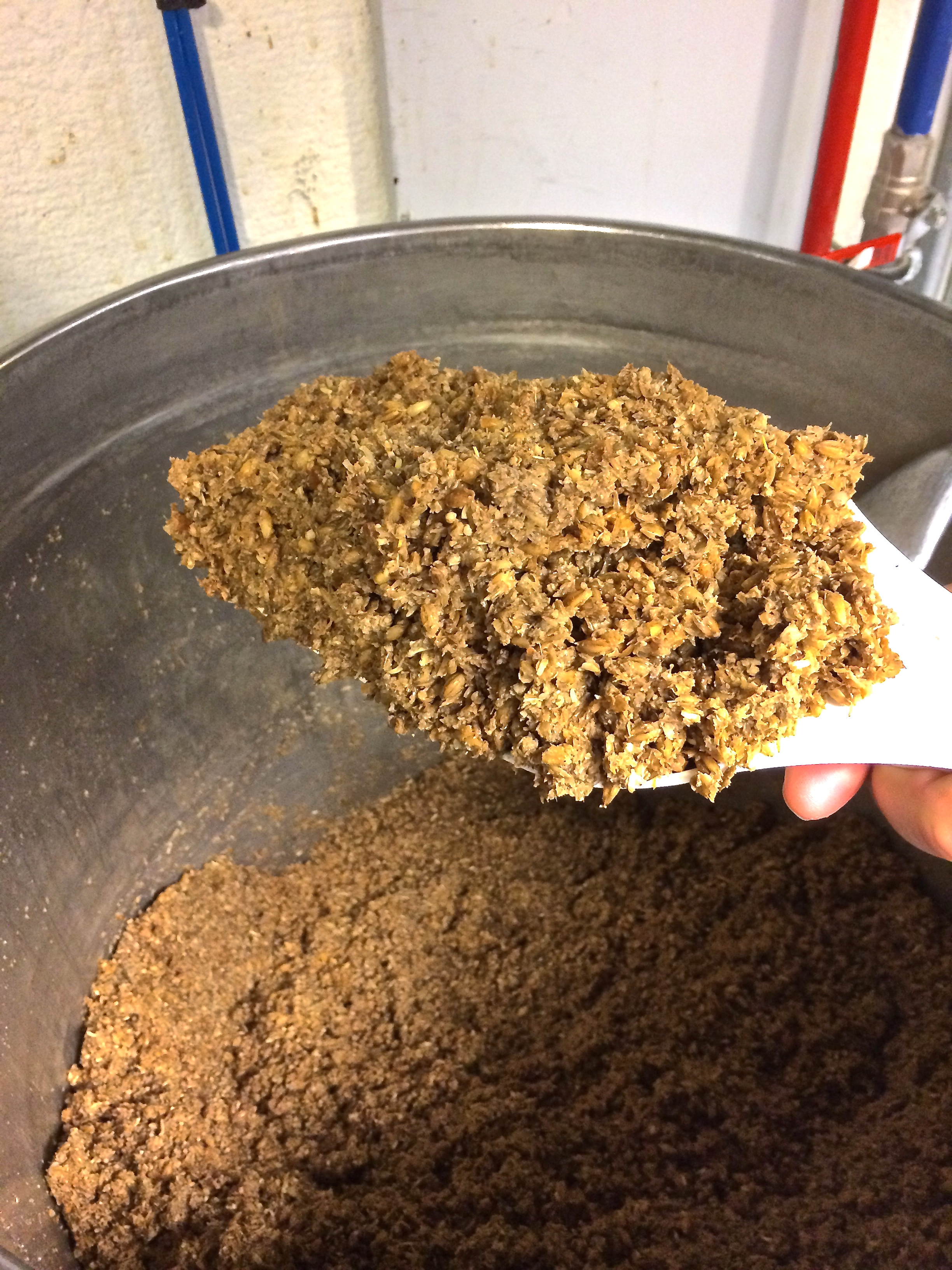 Billedet viser mask efter mæskningen.